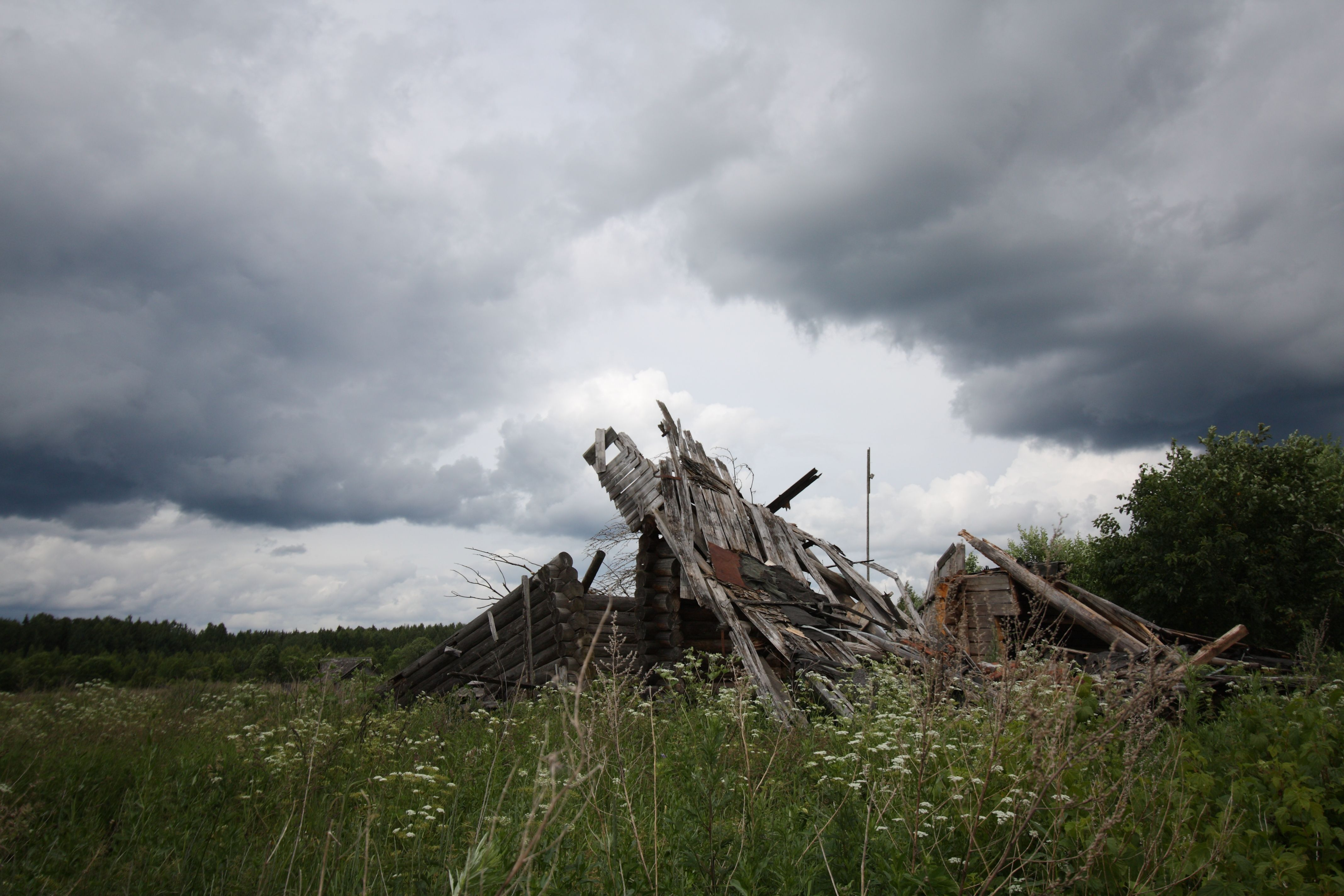 Печниково. Россия, Тверская область, Кувшиновский район)